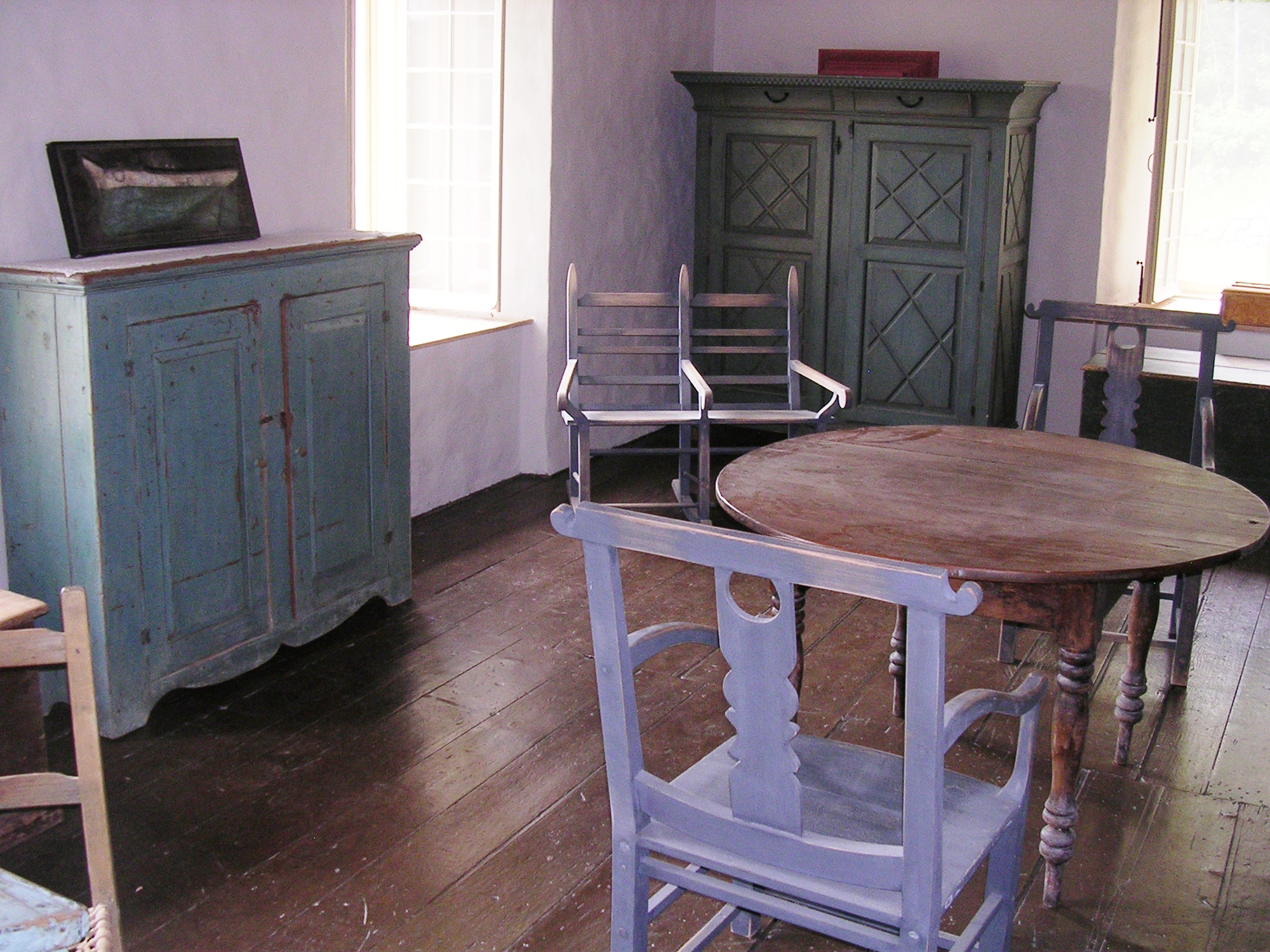 Logis du meunier au moulin de la Rémy à Baie-Saint-Paul (Québec); moulin à eau; moulin à farine; mobilier; antiquités